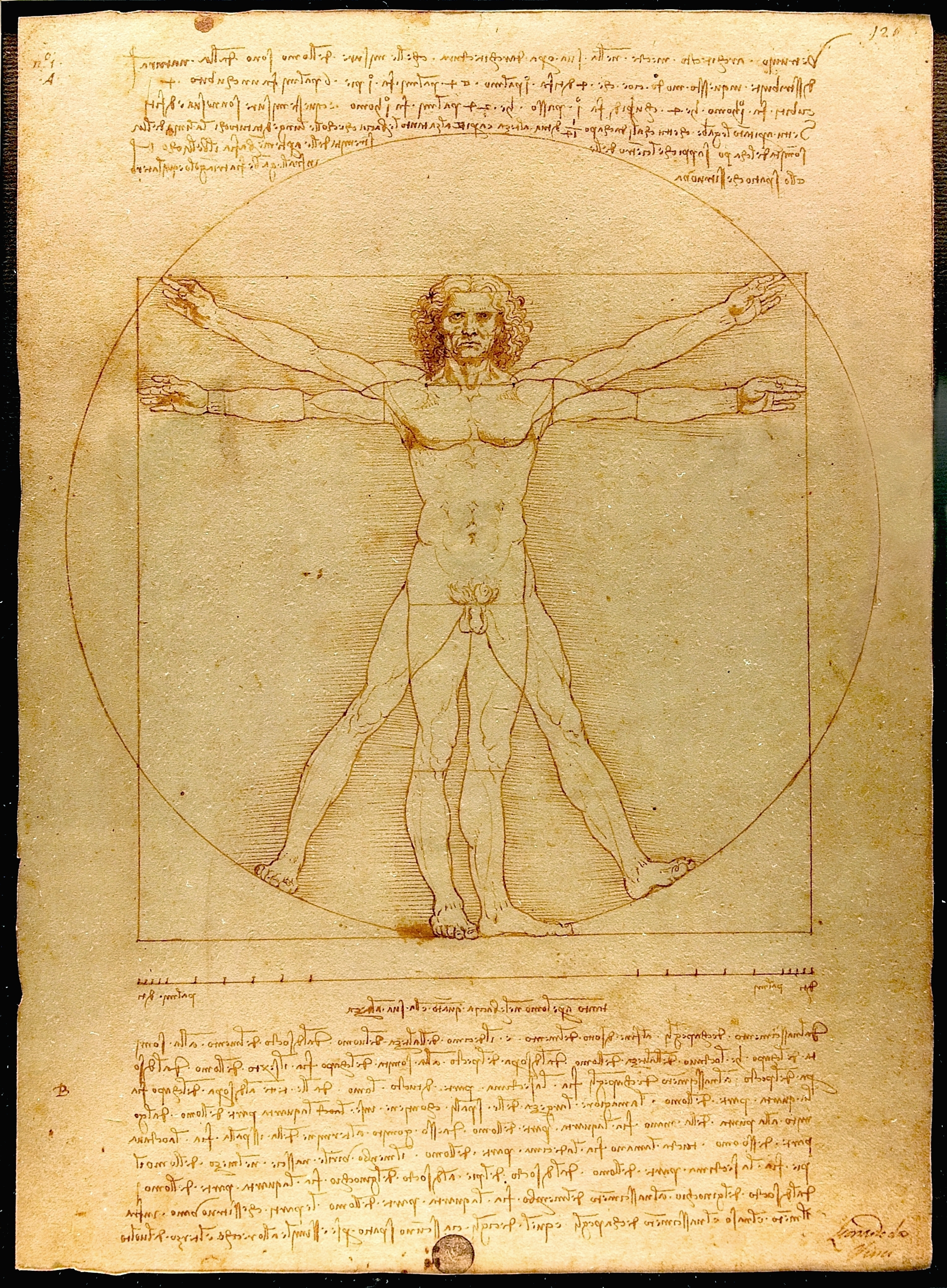 Vitruvian Man